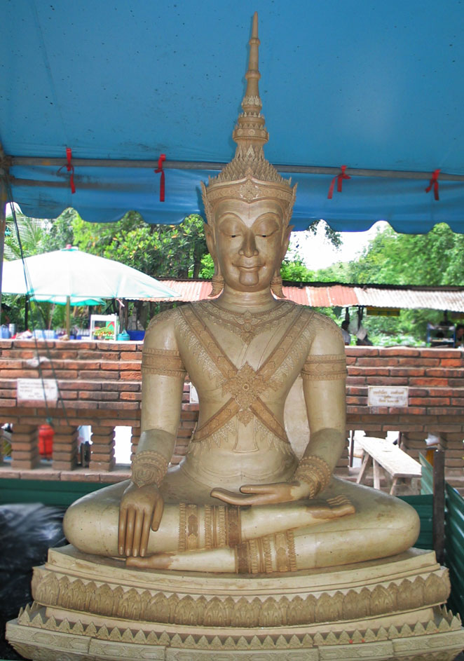 Sitting Buddha, Subduing Mara, Ayutthaya style, Wat Na Phra Men, Ayutthaya, Thailand Sitting Buddha, Subduing Mara, Ayutthaya style, Wat Na Phra Men, Ayutthaya, Thailand